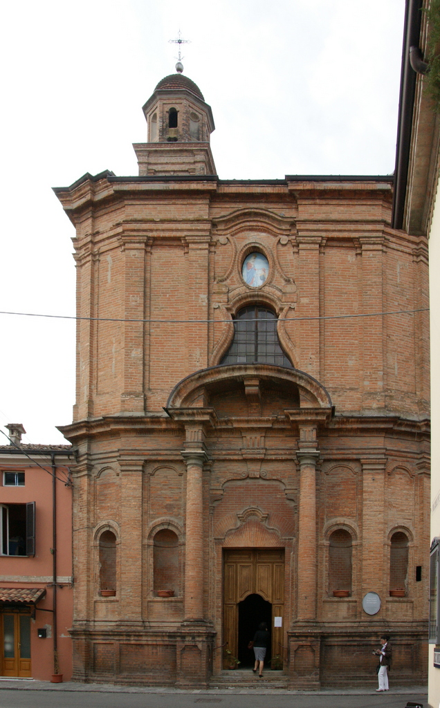 Chiesa della Beata Vergine di Caravaggio